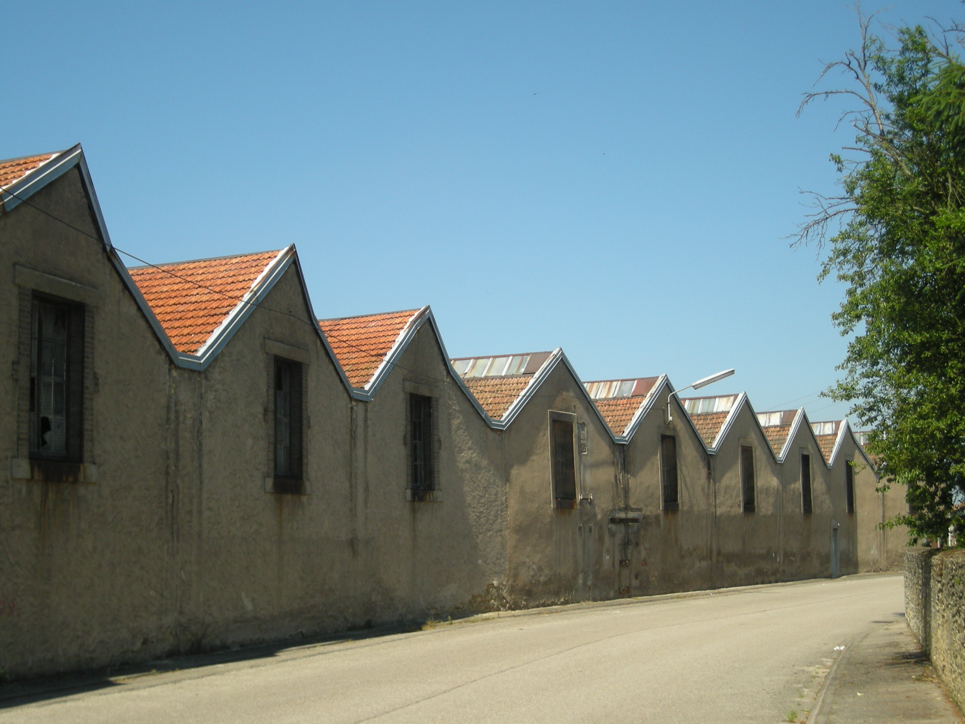 Faïenceries de Saint-Clément (Meurthe-et-Moselle)